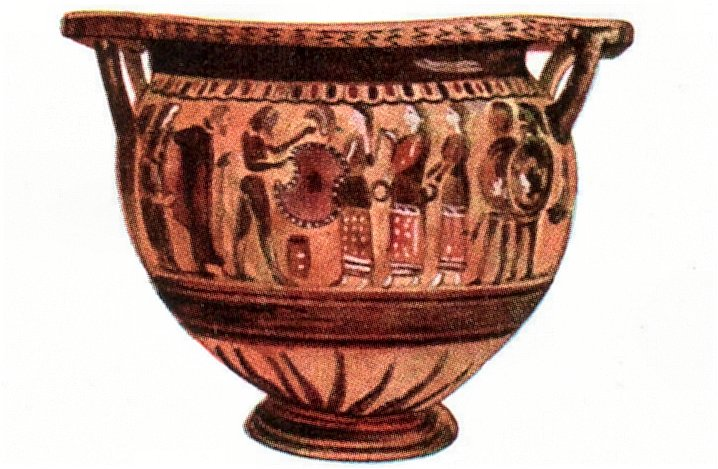 Eine griechische Vase, ein sogenannter: "Attischer Krater".